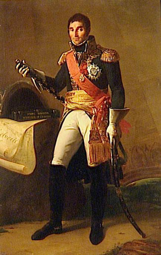 ANDRE MASSENA, DUC DE RIVOLI, PRINCE D'ESSLING, MARECHAL DE FRANCE (1756-1817)